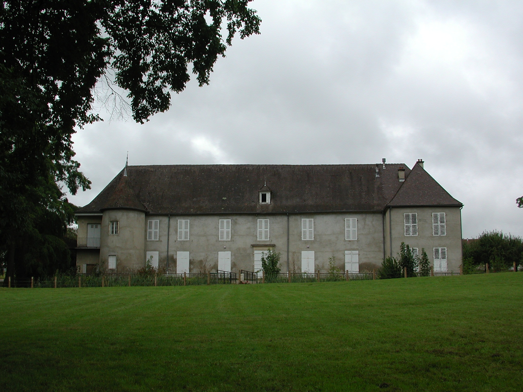 Bellerive-sur-Allier (Allier, France). Château du Bost, côté parc. 2008.